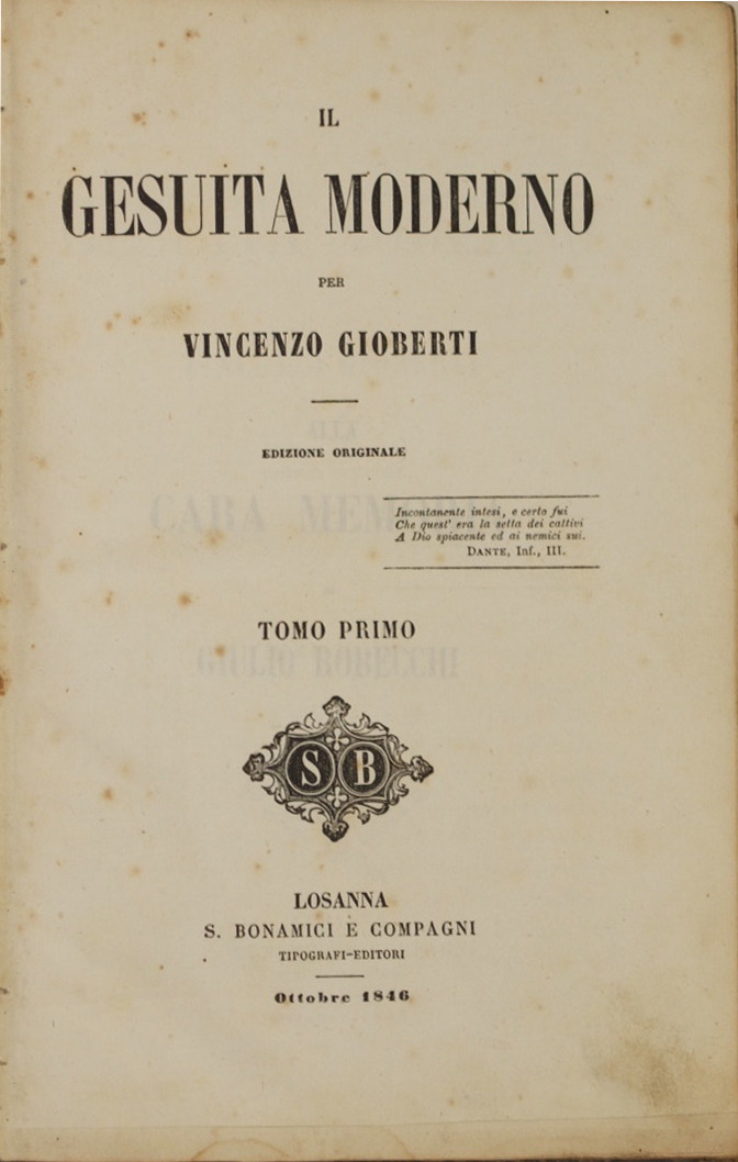 Page de garde du premier volume de Il Gesuita moderno, imprimé par Stanislao Antonio Bonamici à Losanne.